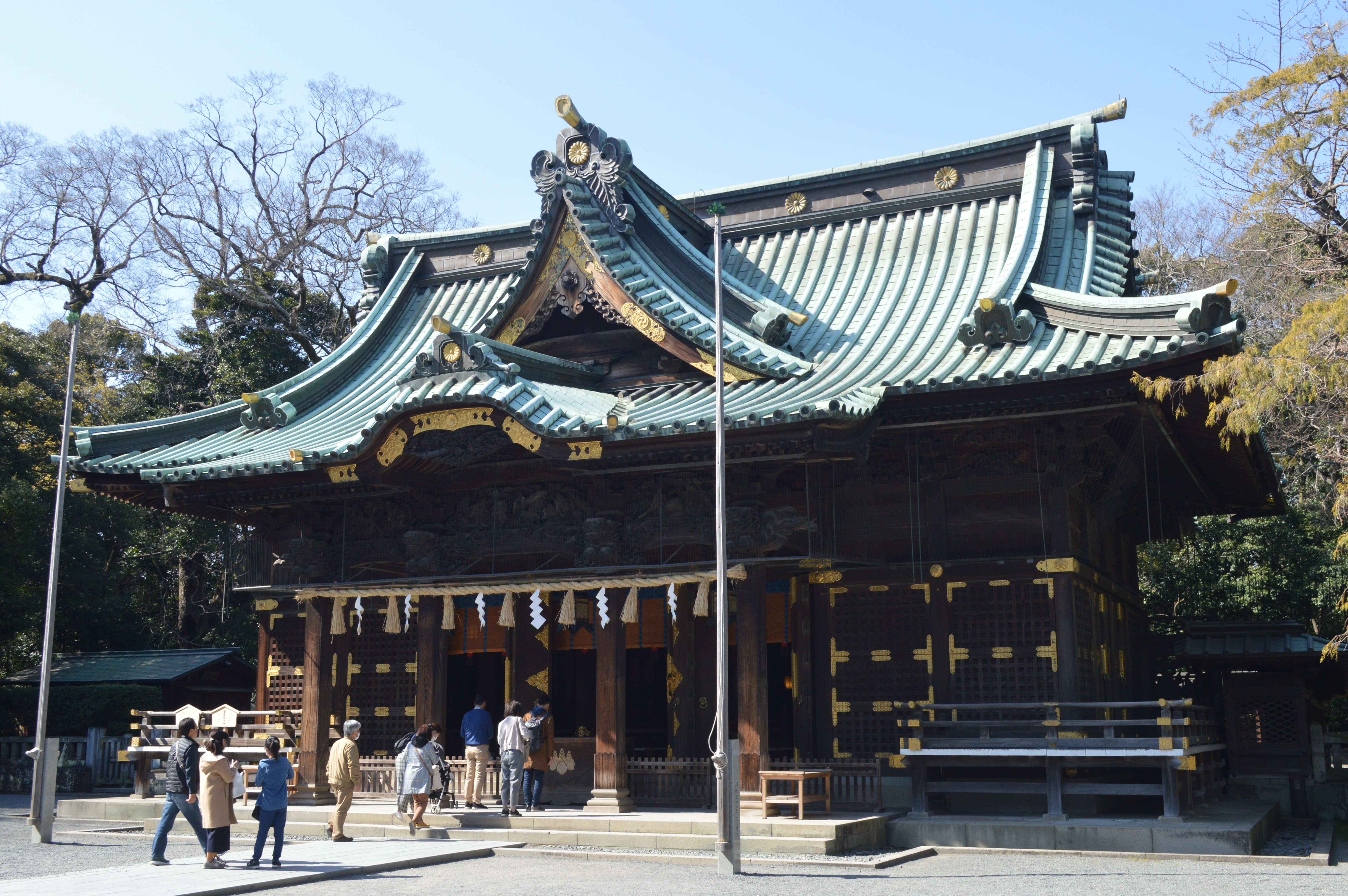 静岡県三島市大宮町2丁目1-5にある三嶋大社。拝殿。